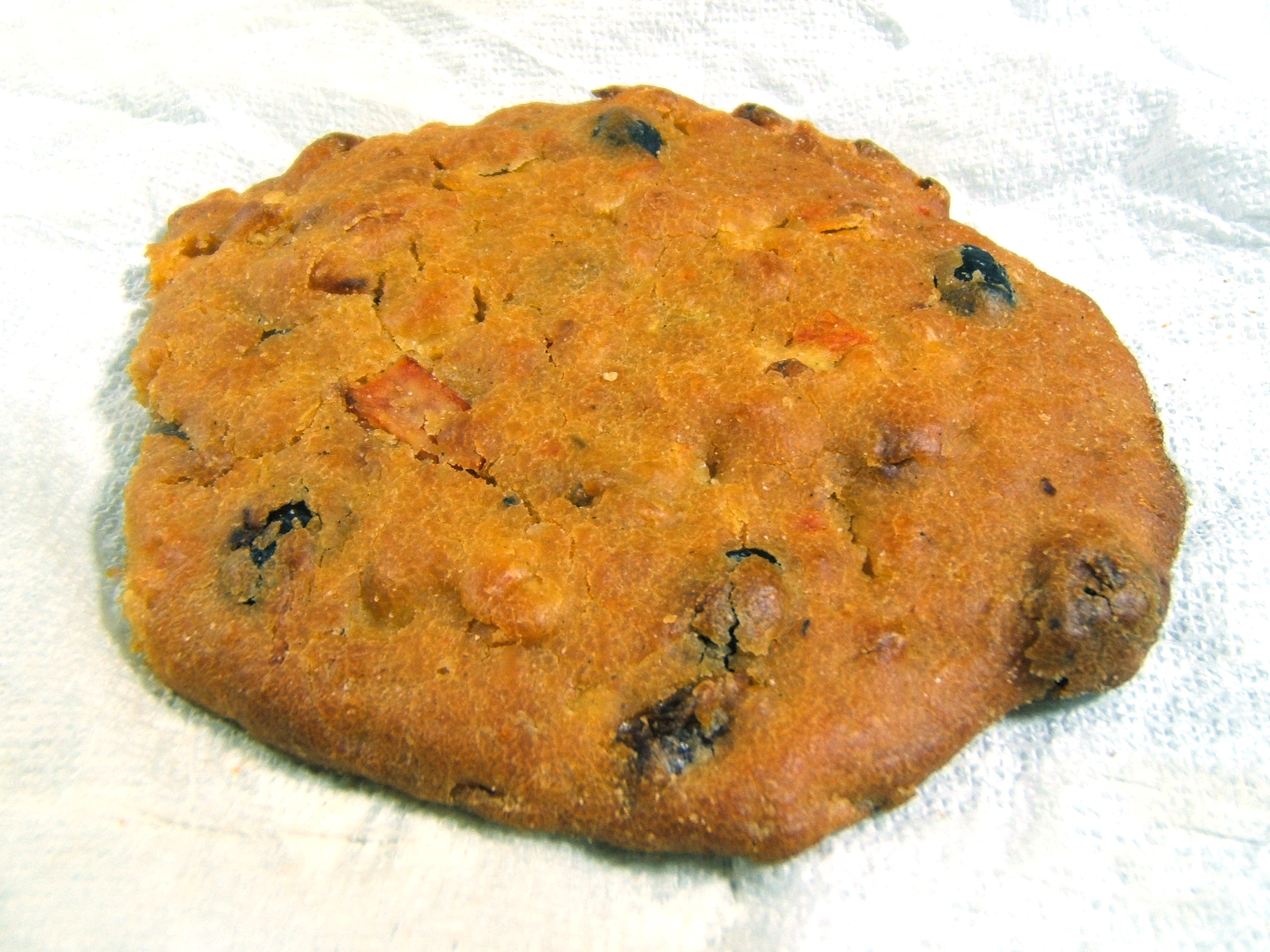 Sceblasti piccante - sagra della sceblasti a Zollino